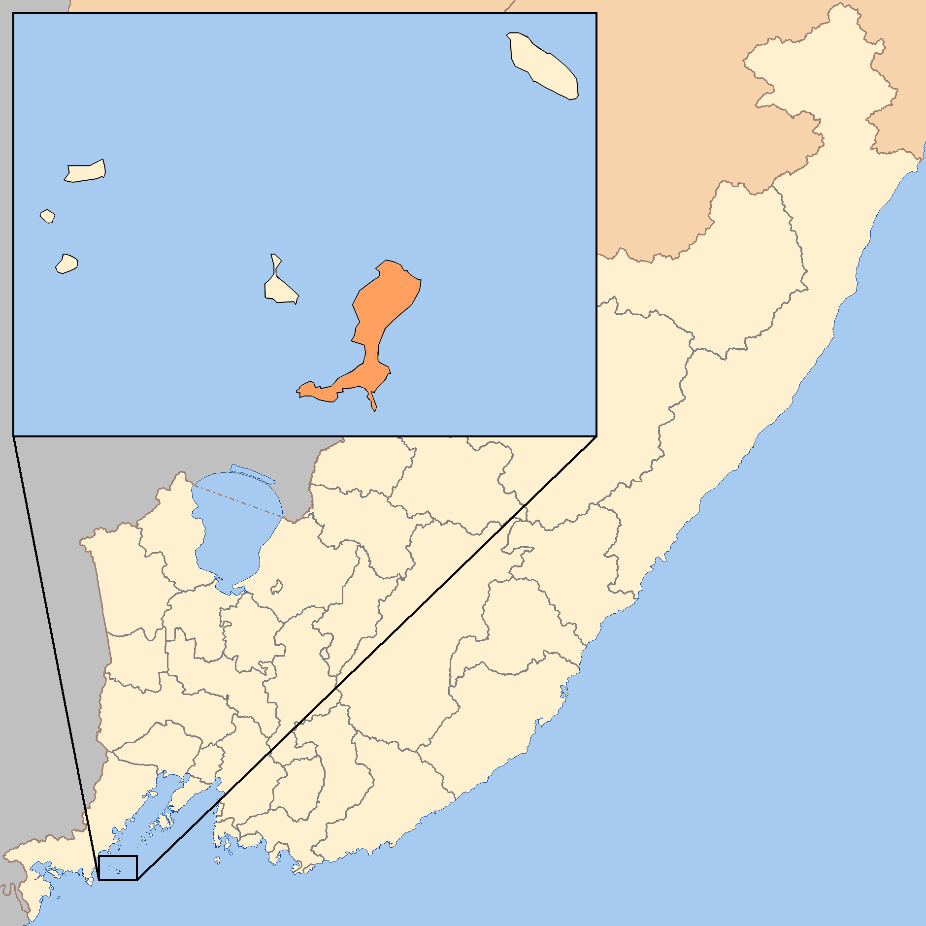 Остров Большой Пелис на карте Приморского края